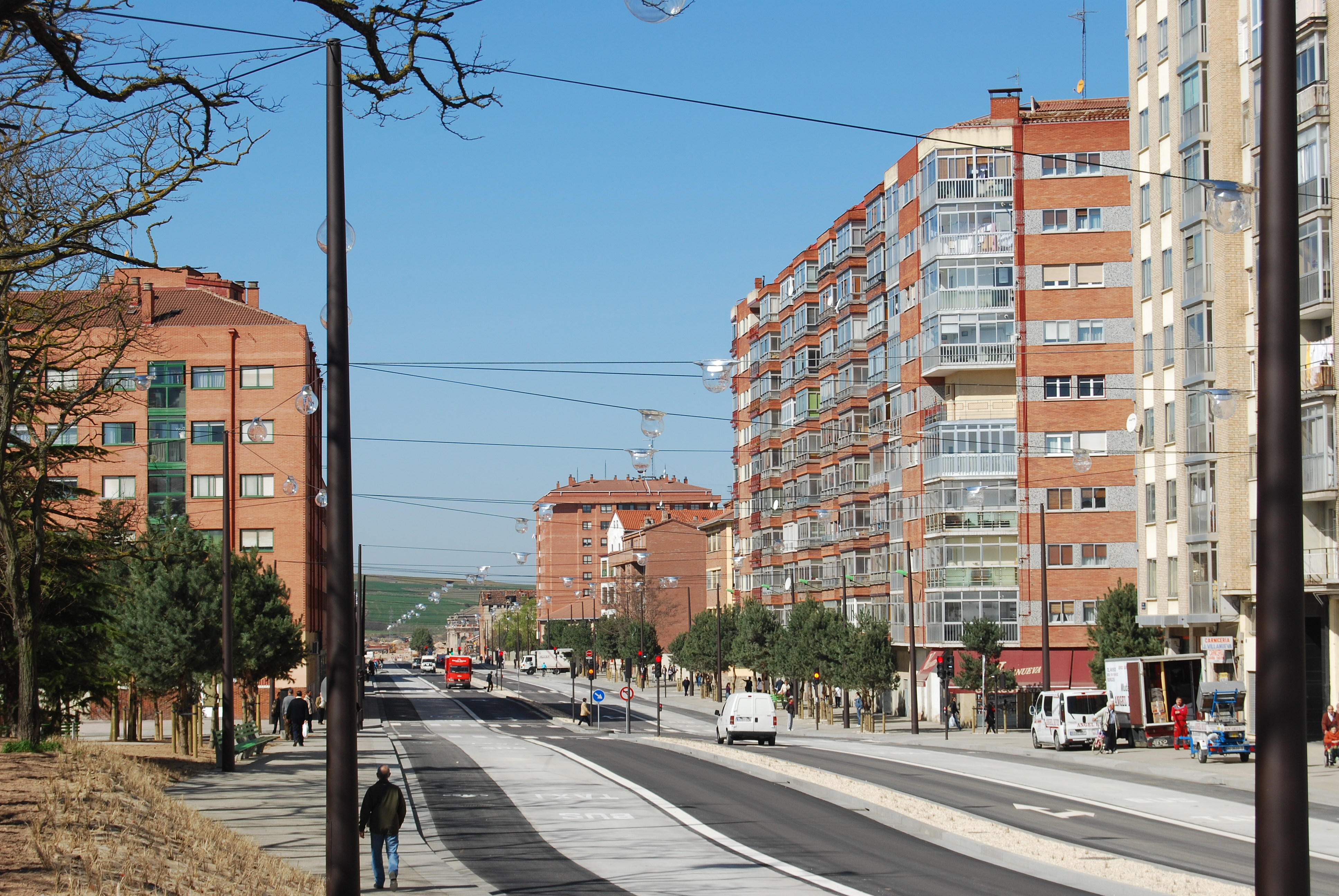 Bulevar Ferroviario de Burgos, desde el Parque de la Nevera. En primer término, los cruces con las calles Juan de Garay (izquierda) y Santa Cruz (derecha). Al fondo, a la derecha, el último edificio que se aprecia es la Antigua Estación de Ferrocarril.